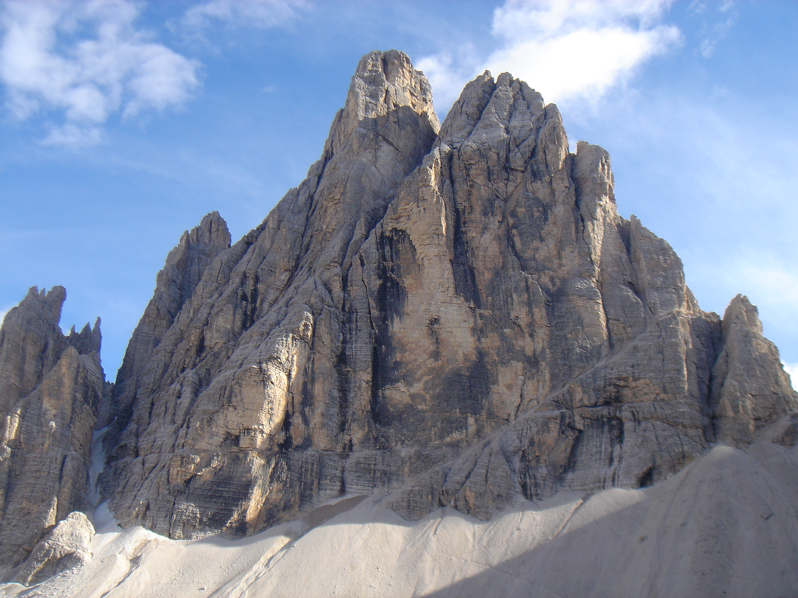 Cima Dodici (Zwölfkofel) o Croda dei Toni dalla Val Fiscalina nelle Dolomiti di Sesto. Fotografata da Paolo Bosetti (Isil) il 15 agosto 2005